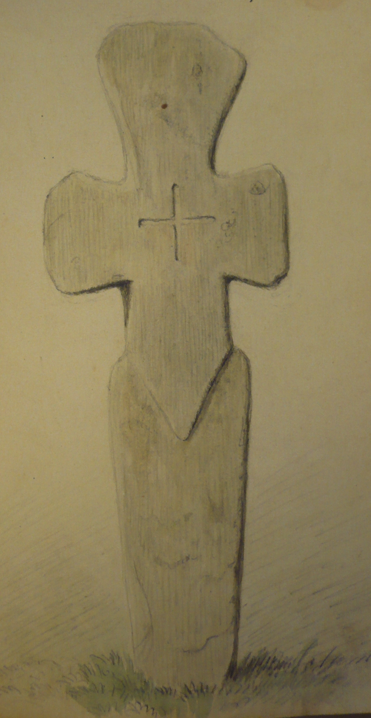 Minnekorset i Steglebakken. Tegnet av Bernhard Fredrik Hansson (1820-1883). Kan være minnekors etter Erling Skjalgsson. Original i Stavanger Museum.